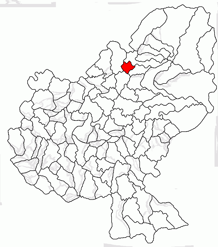 Categorie:Hărţi ale judeţului Mureş